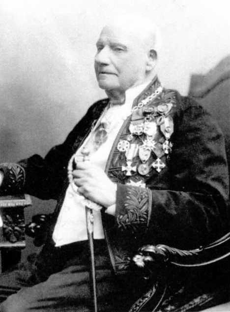 Joaquim Possidónio Narciso da Silva (died in 1896), arquitecto, arqueólogo e fotógrafo português.